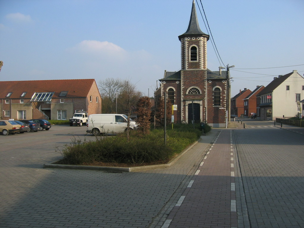 Dorpsplein (voor vernieuwing) en kerk van Molenstede, deelgemeente van Diest.